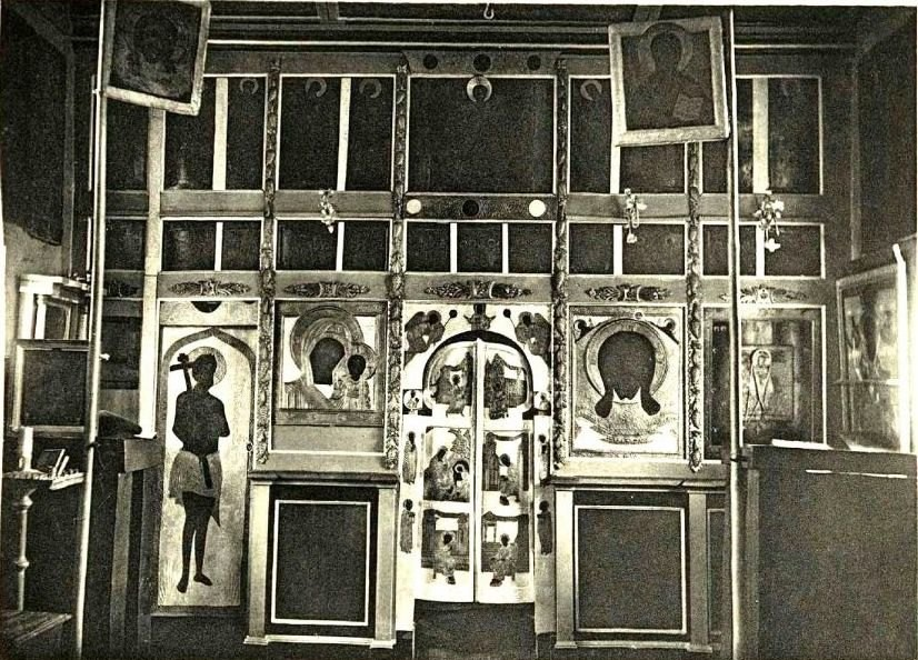 Городищи, урочище. Церковь Параскевы Пятницы. Иконостас, Царские врата, 1912. Россия, Тульская область, Ясногорский район.